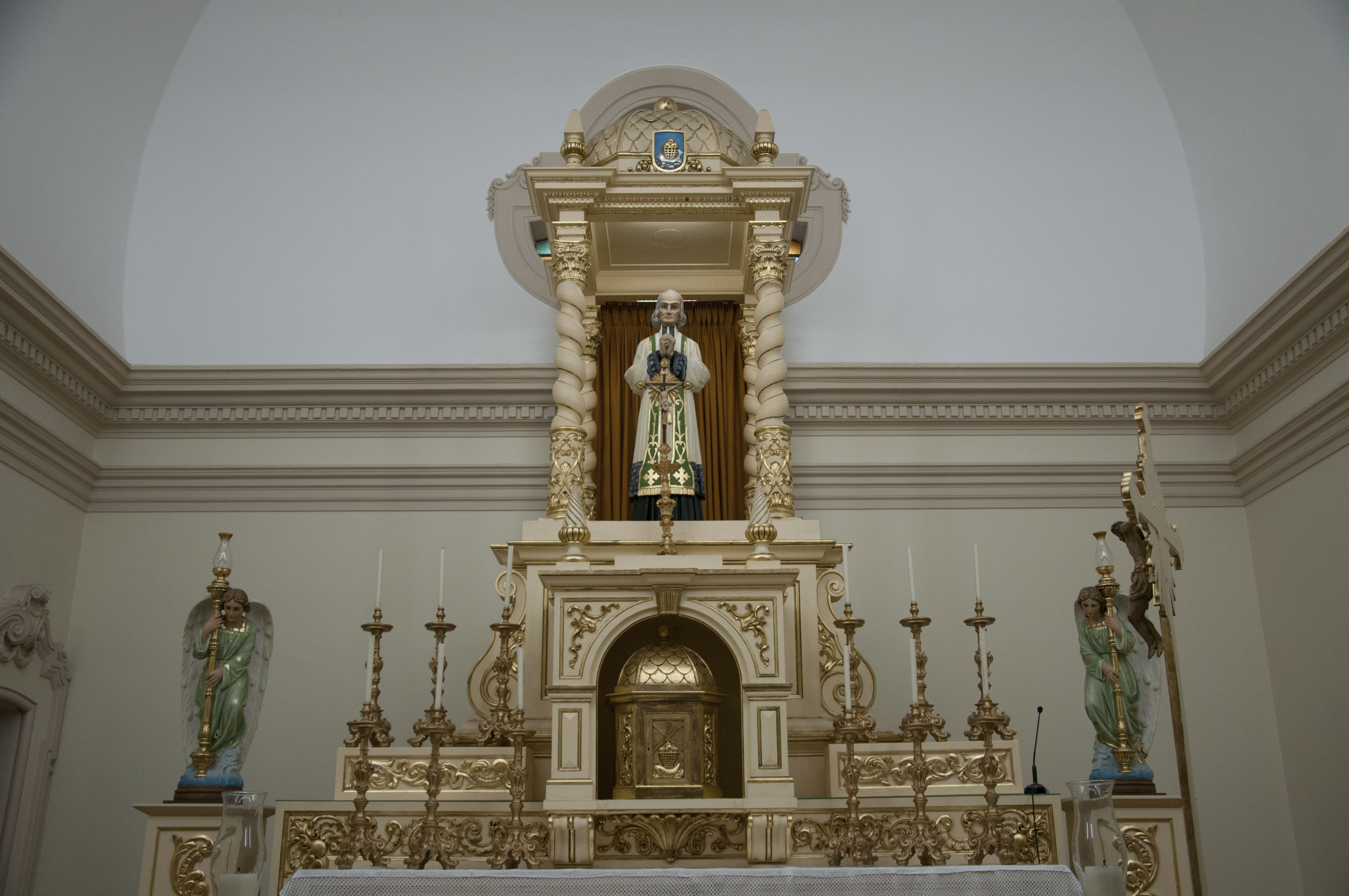 Detalhes do altar da Paróquia São João Maria Vianney